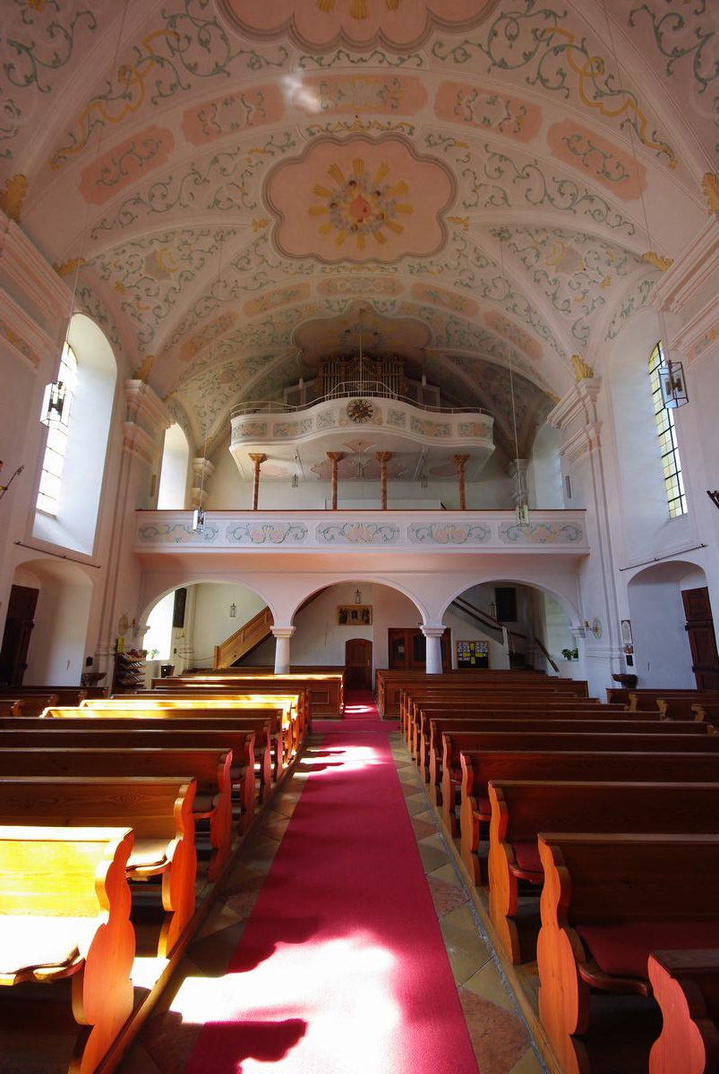 Rathausplatz 2, 83334 Inzell Katholische Pfarrkirche St. Michael Genehmigung für Innenaufnahmen durch Erzbischöfliches Ordinariat München, Ressort Bauwesen und Kunst vom 21.08.2012 liegt schriftlich vor.This is a photograph of an architectural monument.